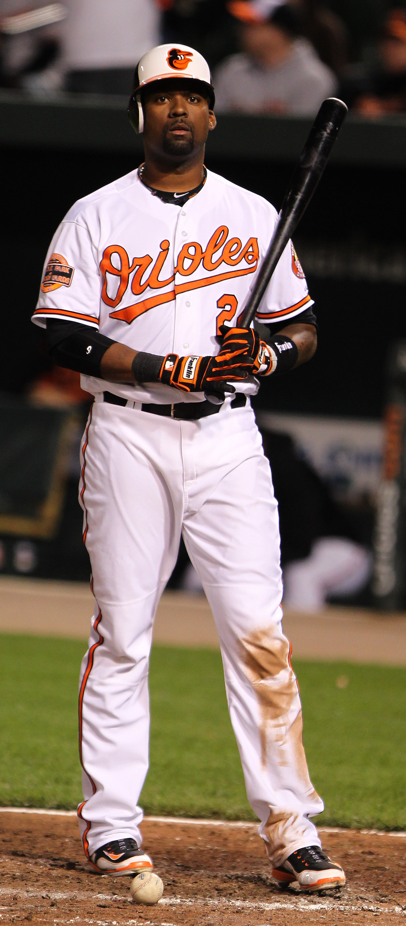 Wilson Betemit